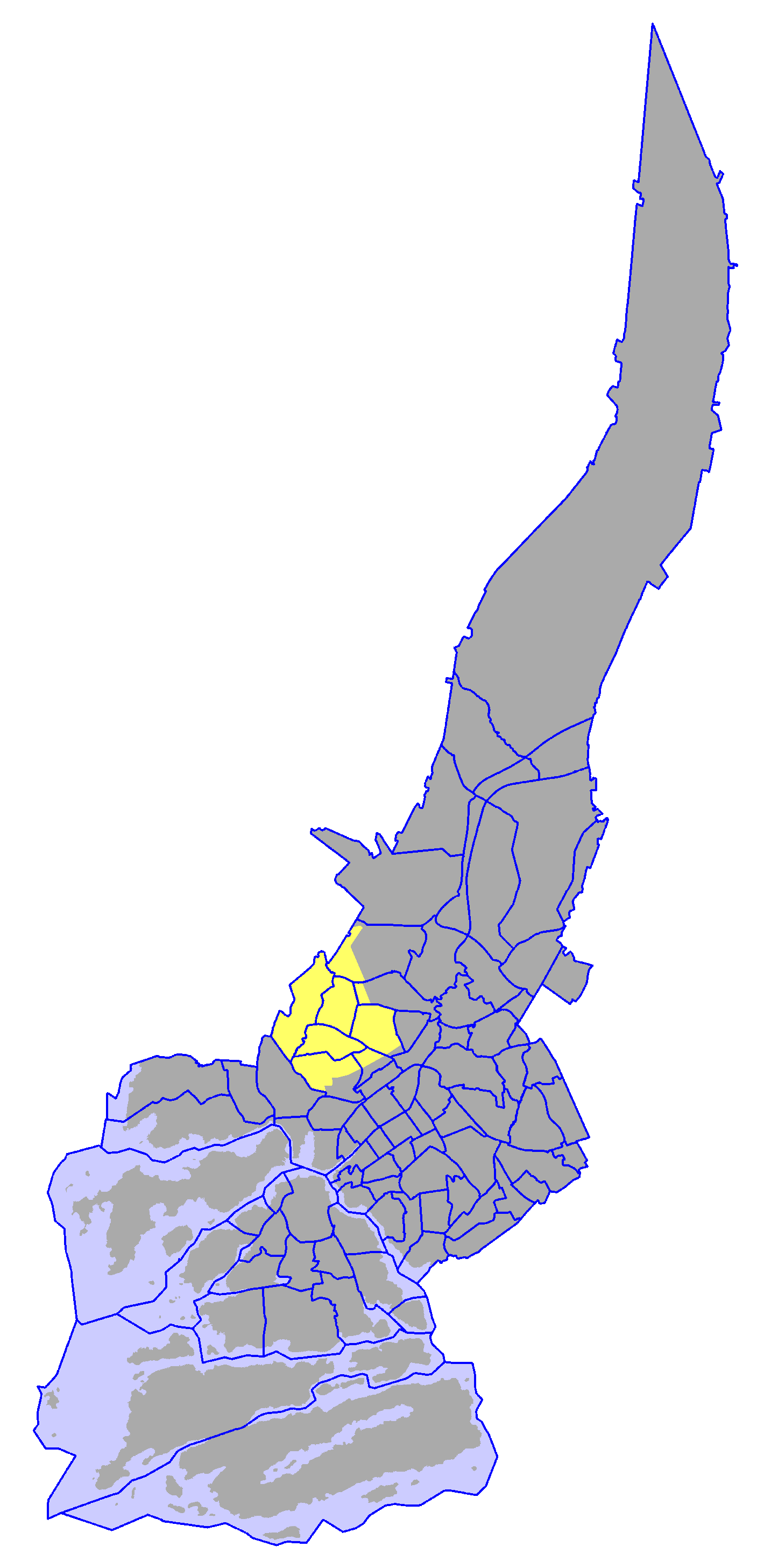 Ward of Kuninkoja, in Turku